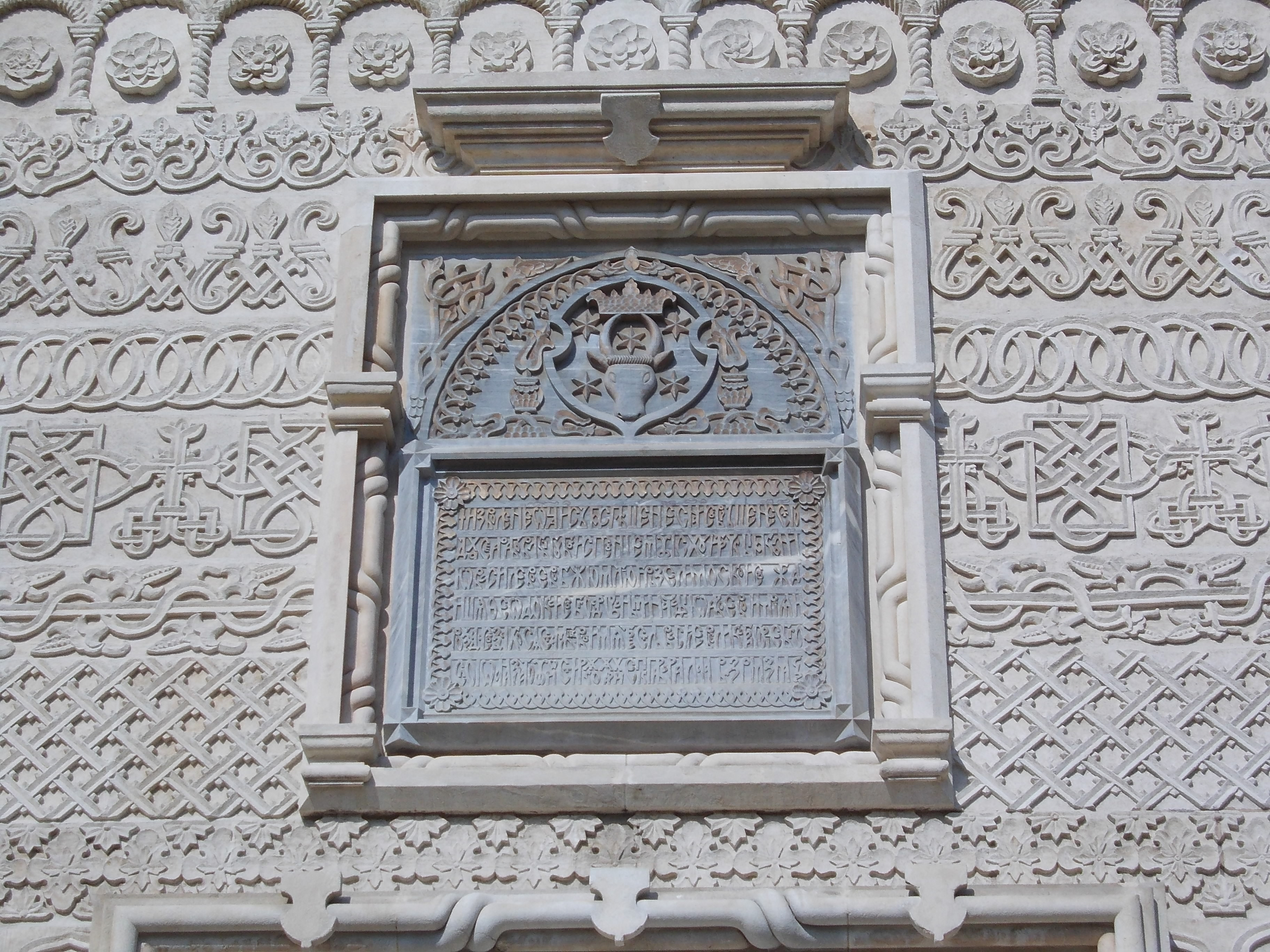 Detaliu Biserica "Sf. Trei Ierarhi" 01